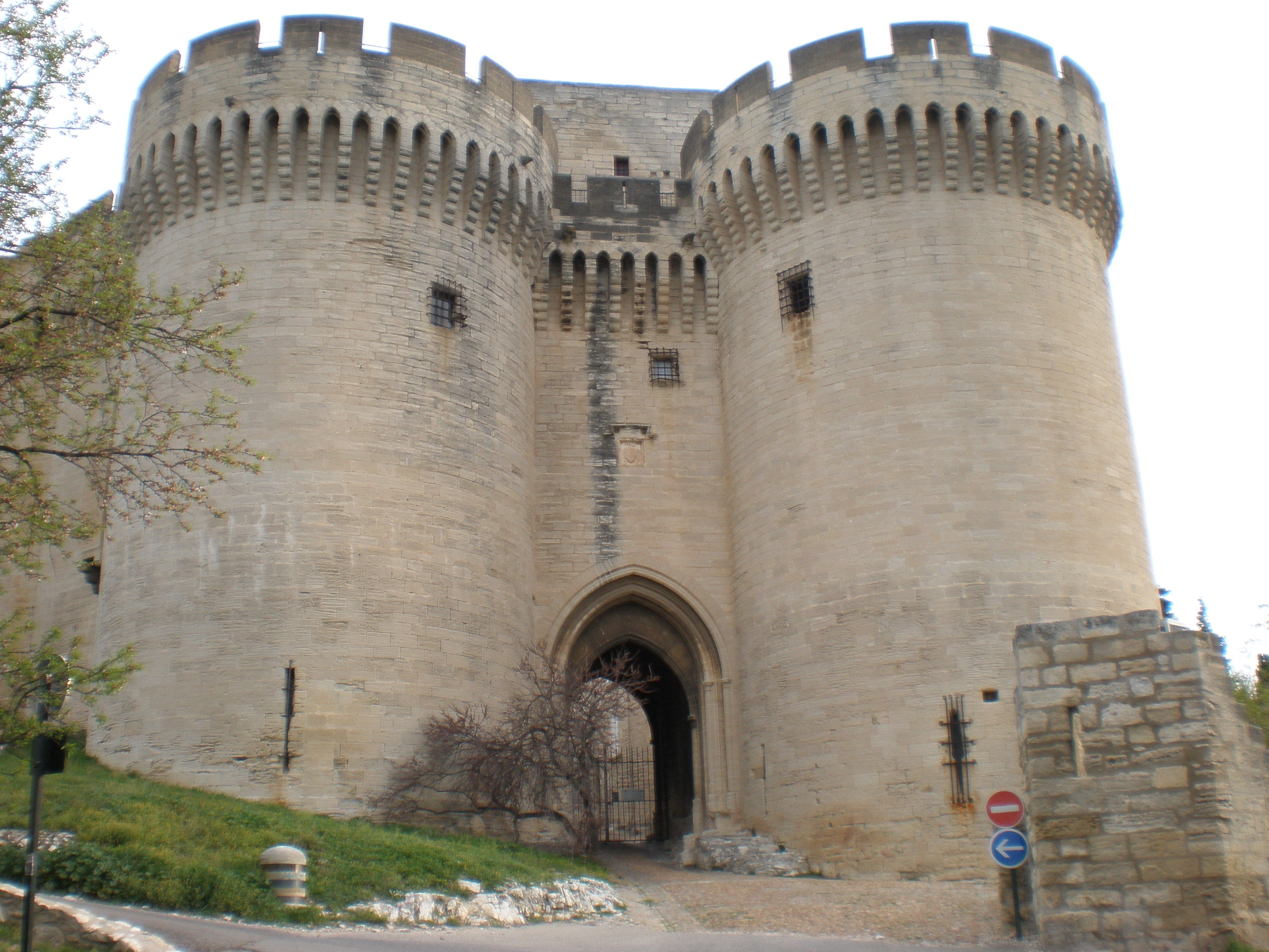 L'entrée du Fort Saint-André de Villeneuve-lès-Avignon (Gard)